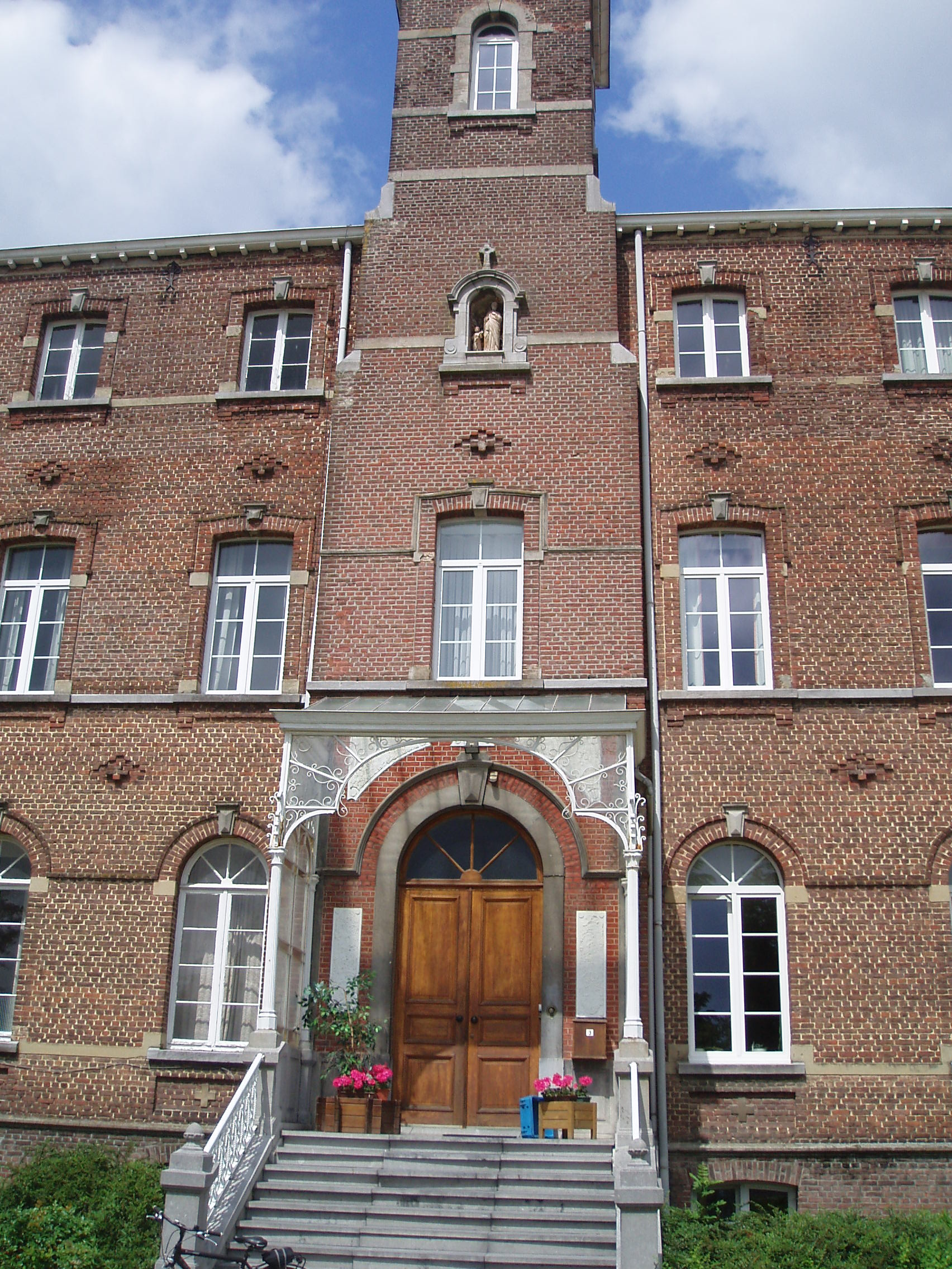 Ursulinen Diestsestraat Herk-de-Stad ingang